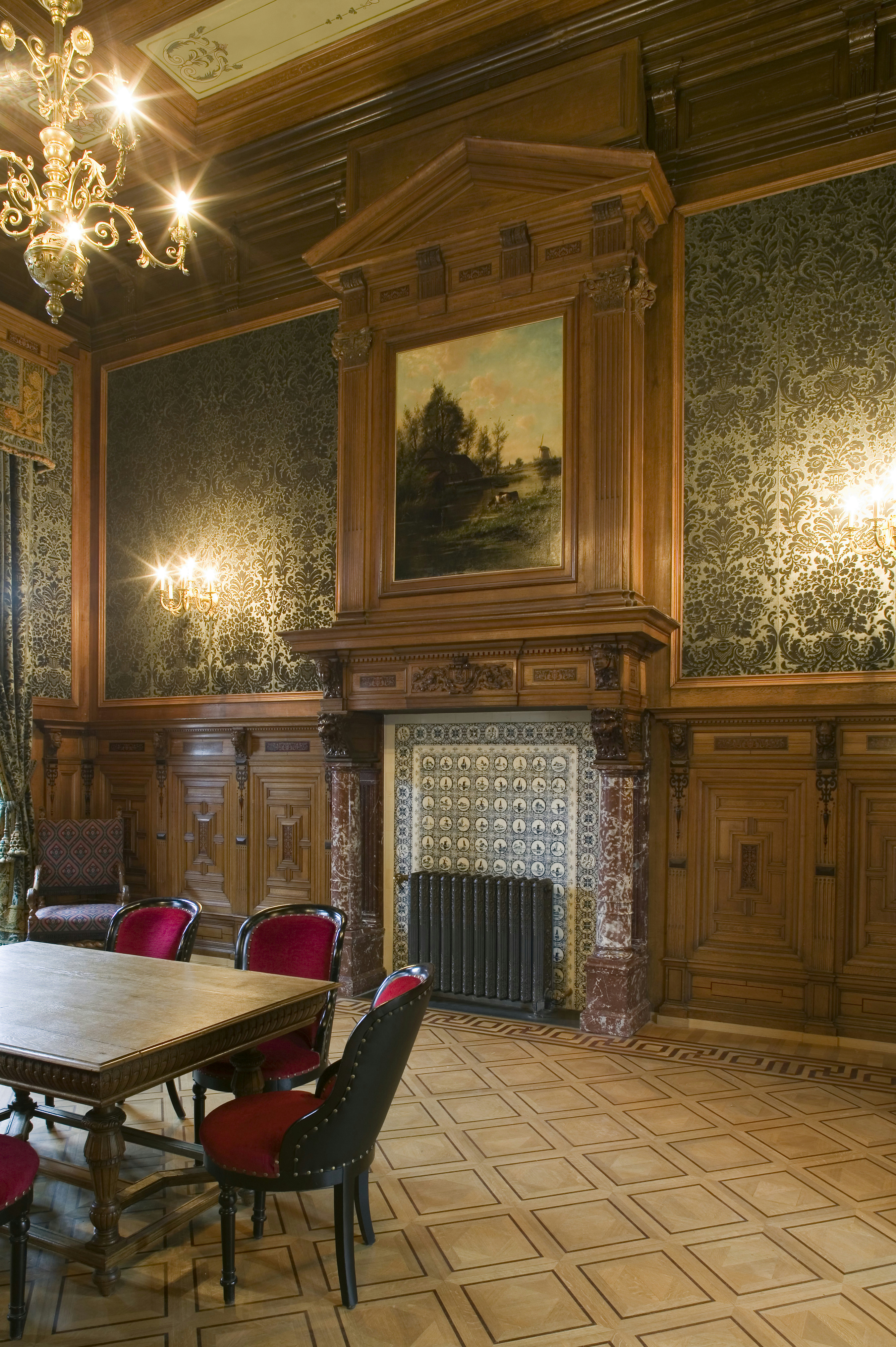 Nederlands Spoorwegmuseum - Voormalig Maliebaanstation: Interieur, overzicht van de schouw met schouwstuk in de koninklijke wachtkamer (opmerking: Foto's zijn van na de verbouwing/restauratie beginjaren 2000)